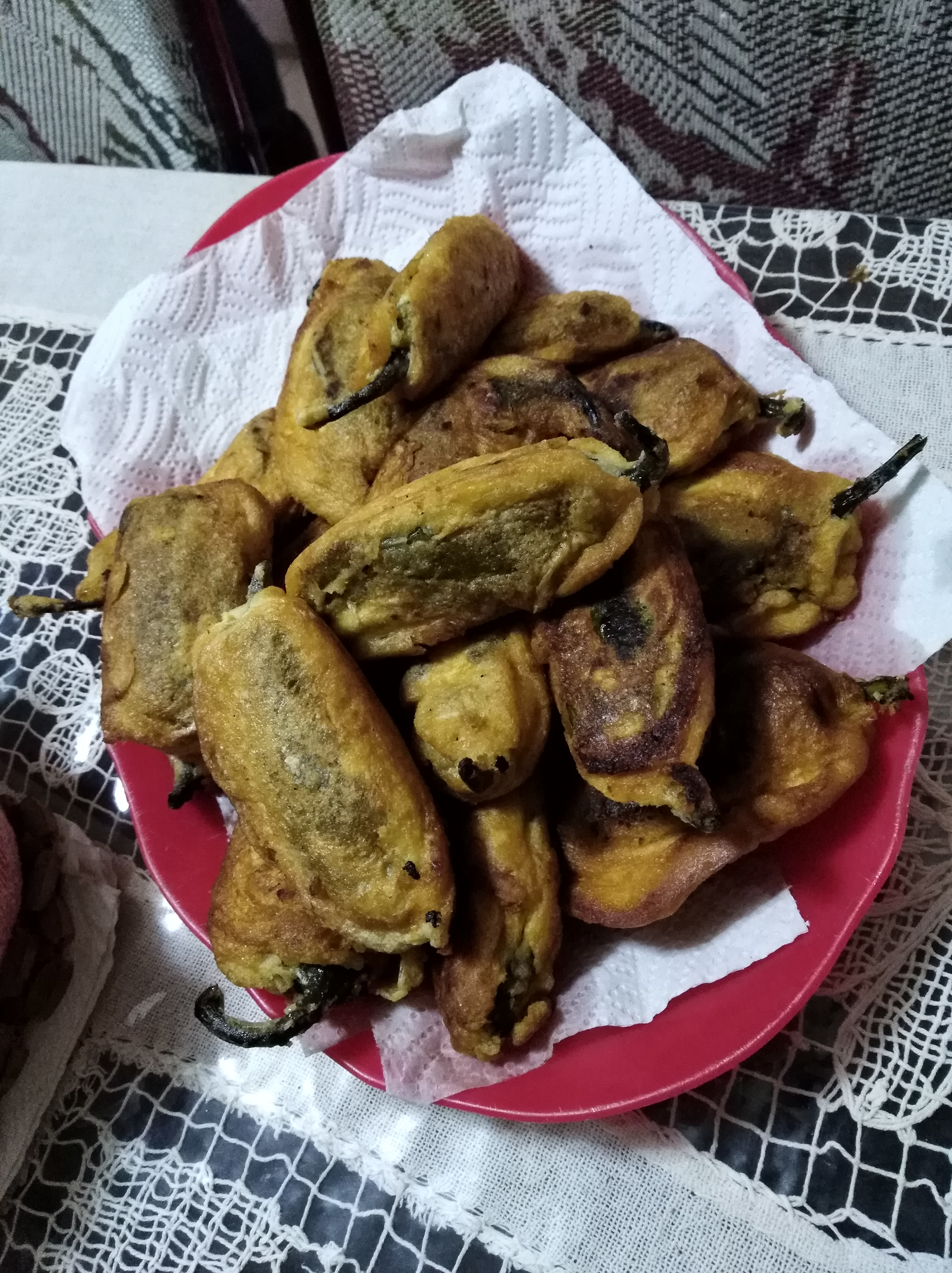 fotografía de este tipico guisado